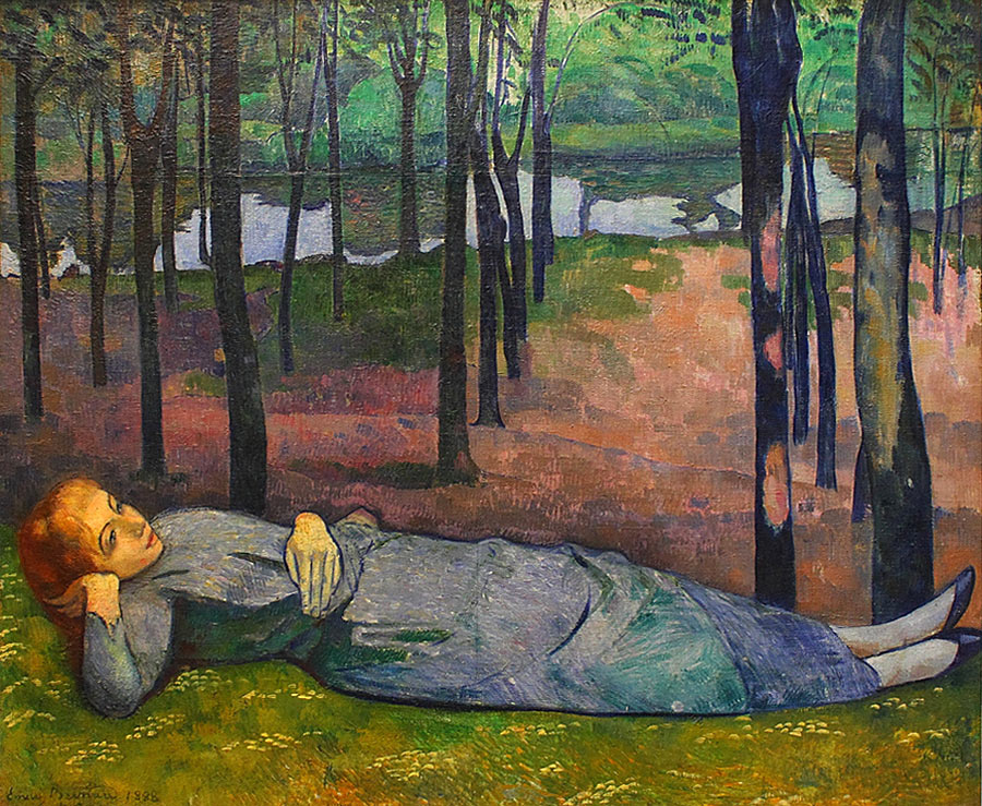 Madeleine au Bois d'Amour - See Details (Détails – Particulari – Detalles)